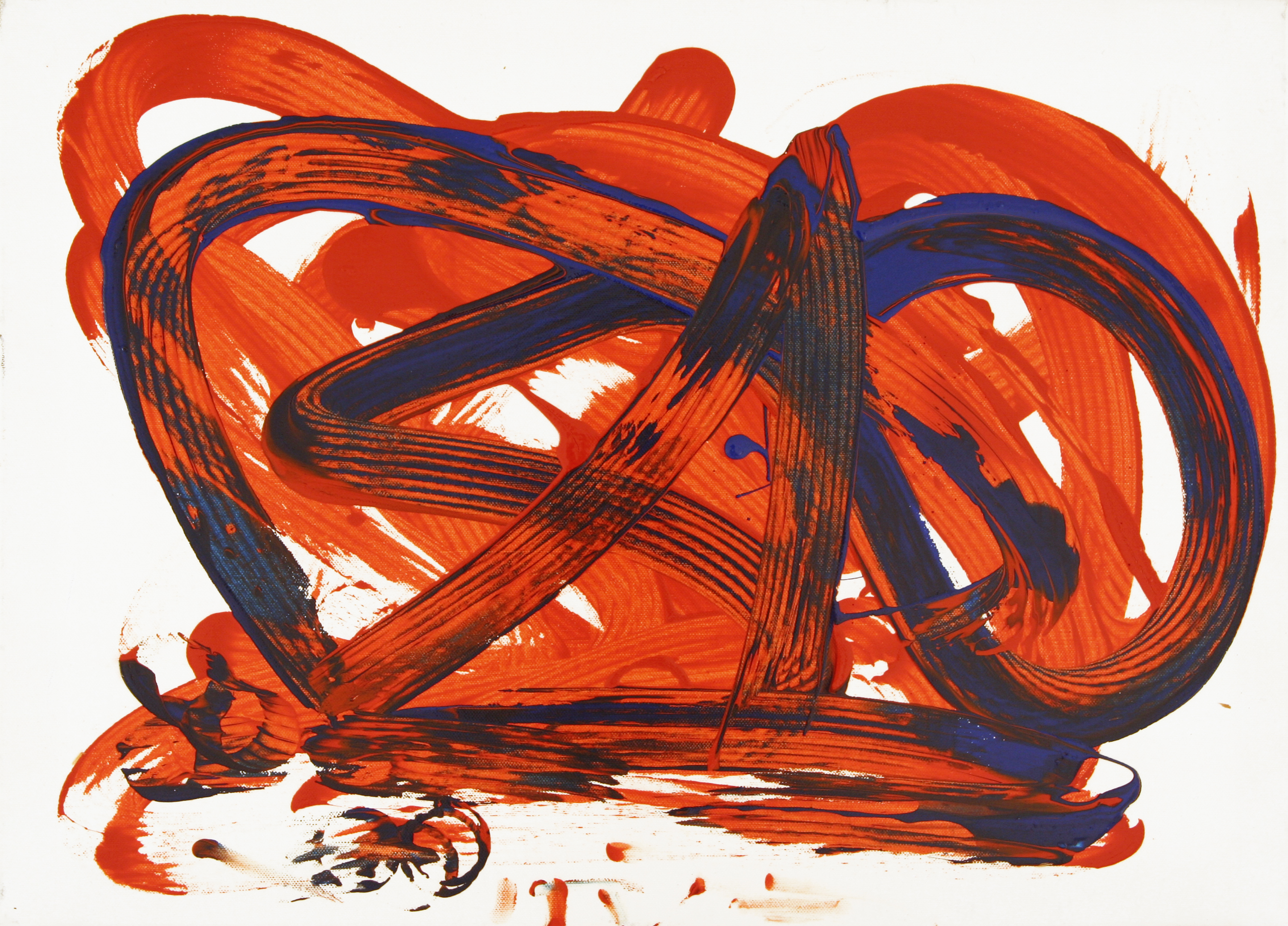 Barito 0138, 50 x 70 cm, Acryl auf Leinwand, 2012